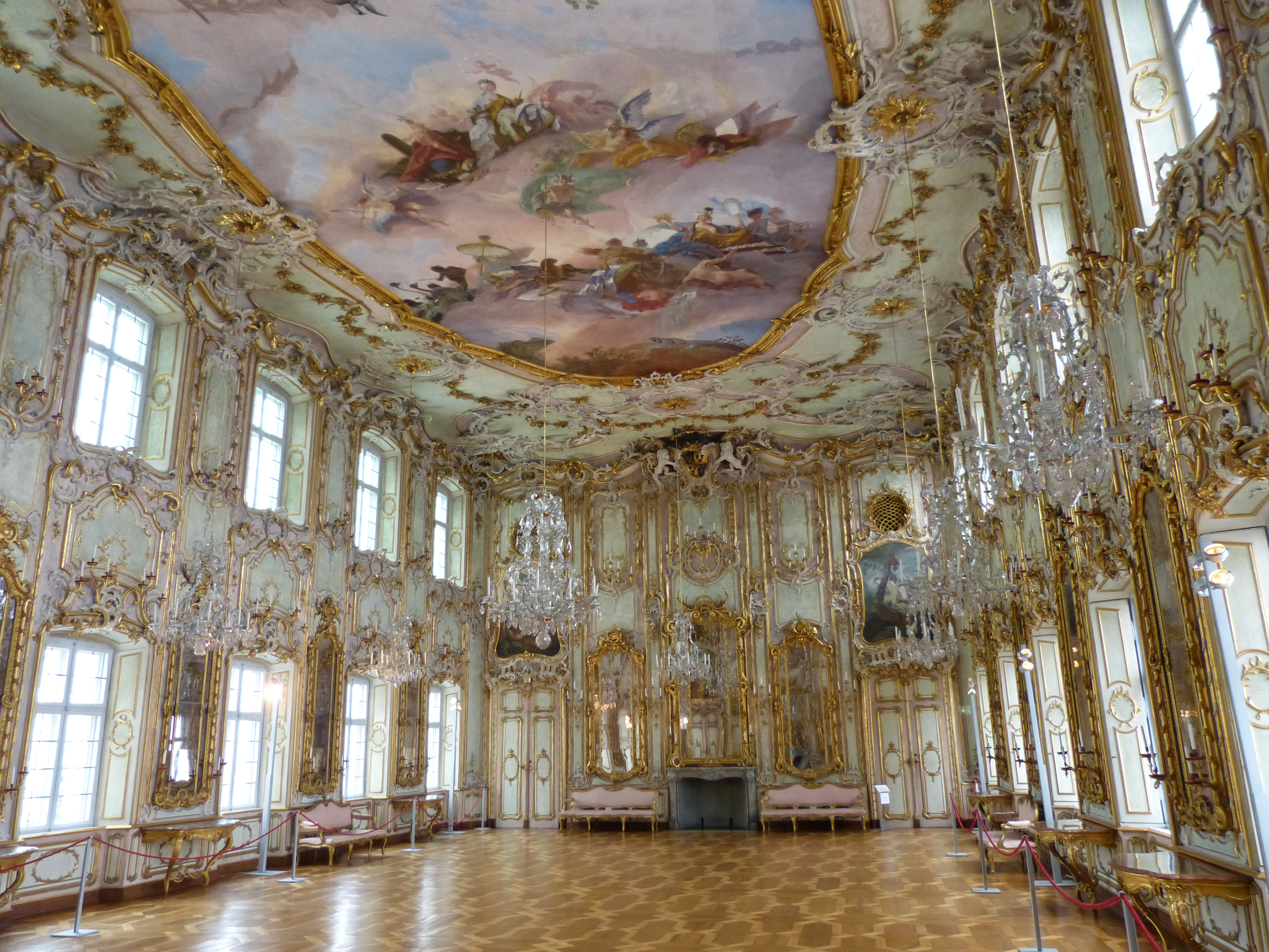 Schaezlerpalais, Augsburg, Bayern